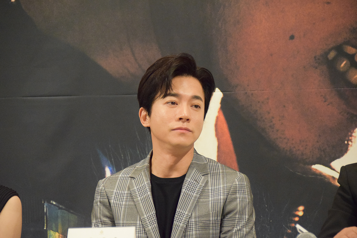 김영민 OCN오리지널 '구해줘2' 제작발표회 (2019.4.30)